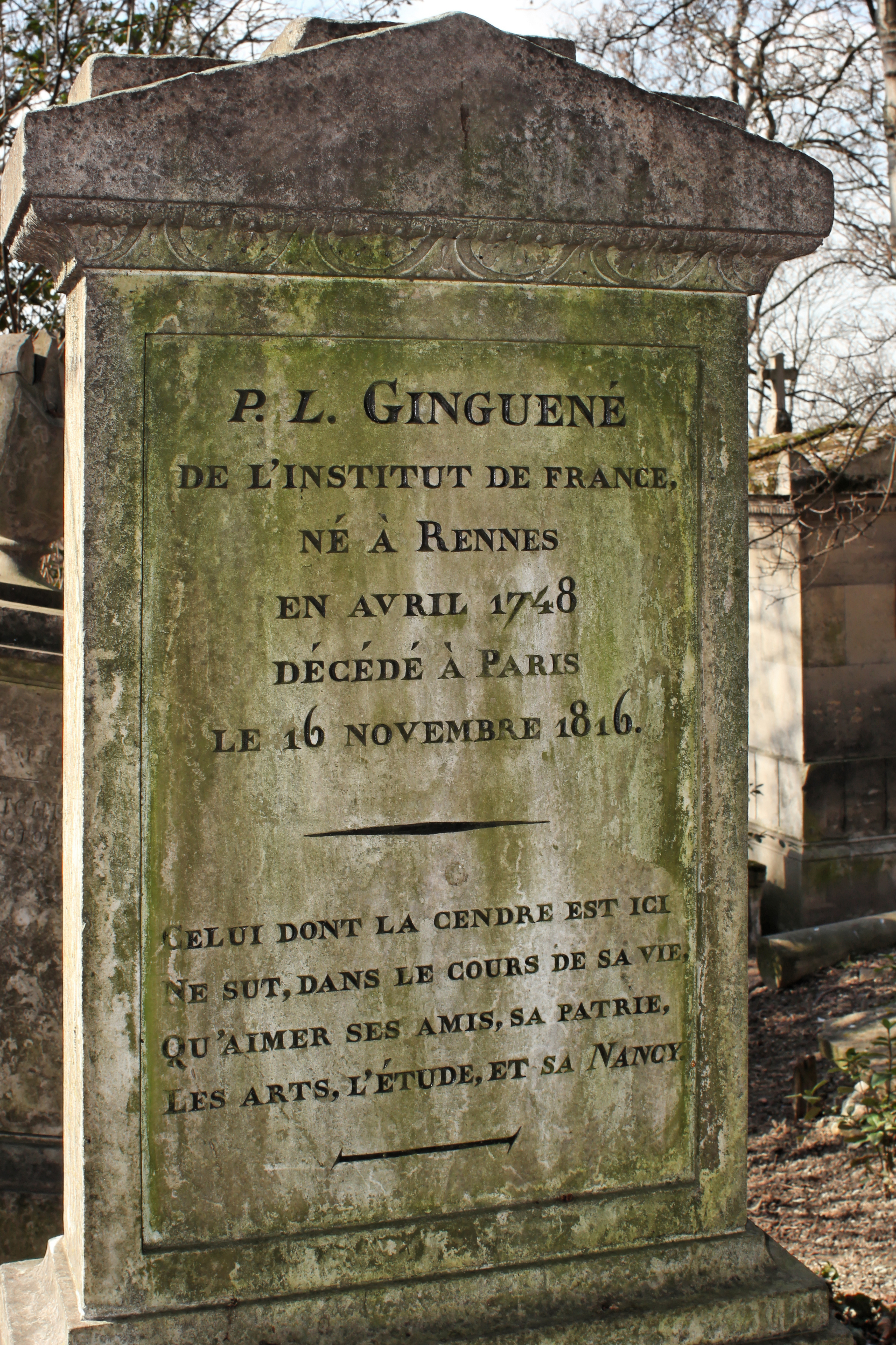 Sépulture de Pierre-Louis Ginguené (1748-1816), journaliste, écrivain, professeur et poète. Il a rédigé son épitaphe